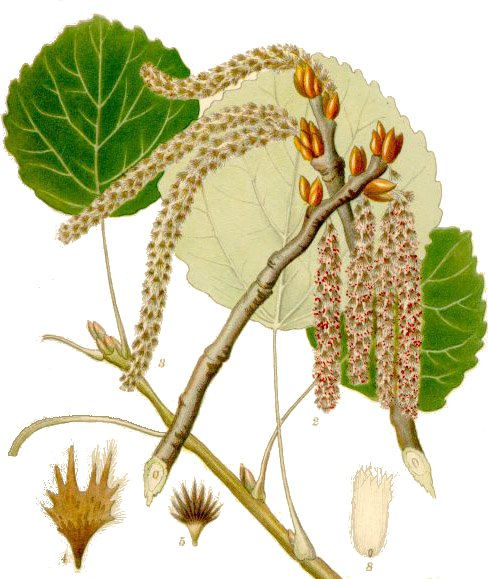 Populus tremula